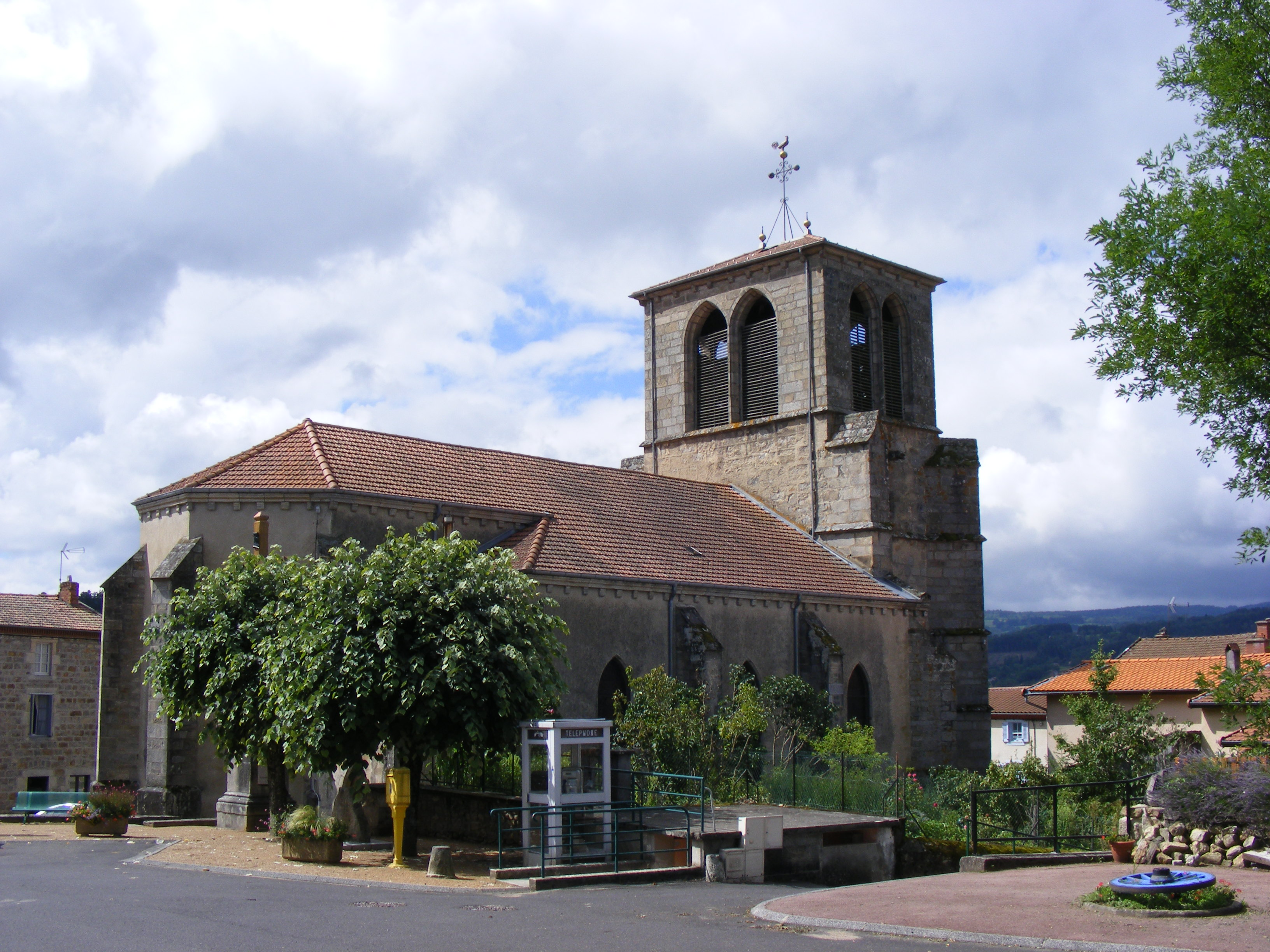 Eglise de Marat